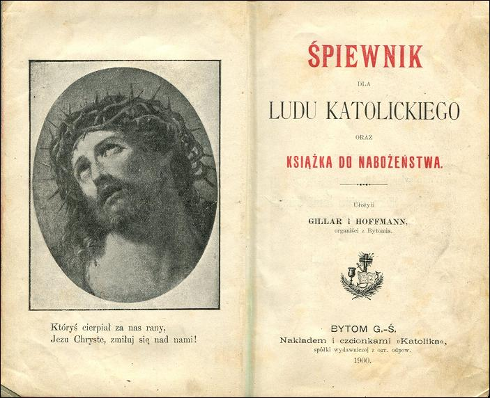 Śpiewnik dla ludu katolickiego oraz książka do nabożeństwa (Gillar/Hoffmann, Bytom 1900)